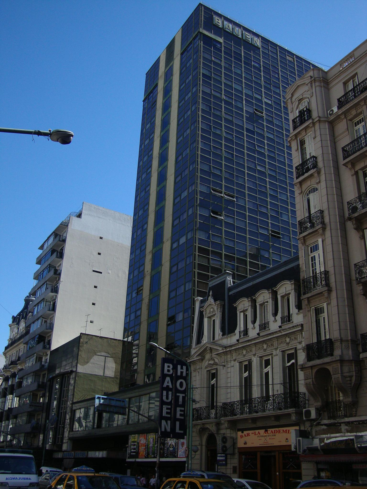 Hotel BAUEN, construido en 1978, en Avenida Callao 360. Buenos Aires, Argentina.